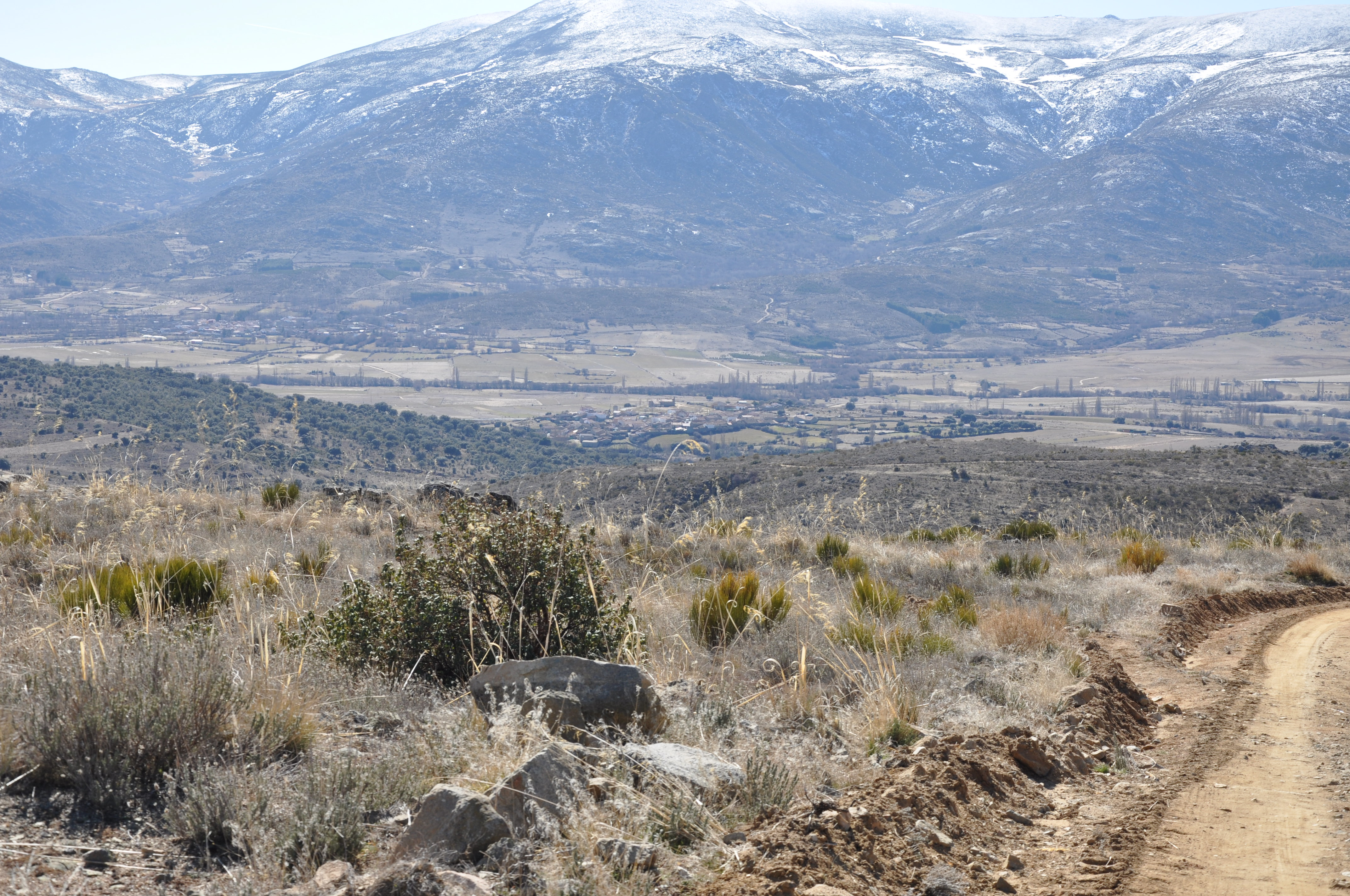 Vista panorámica de Poveda (Ávila), España.